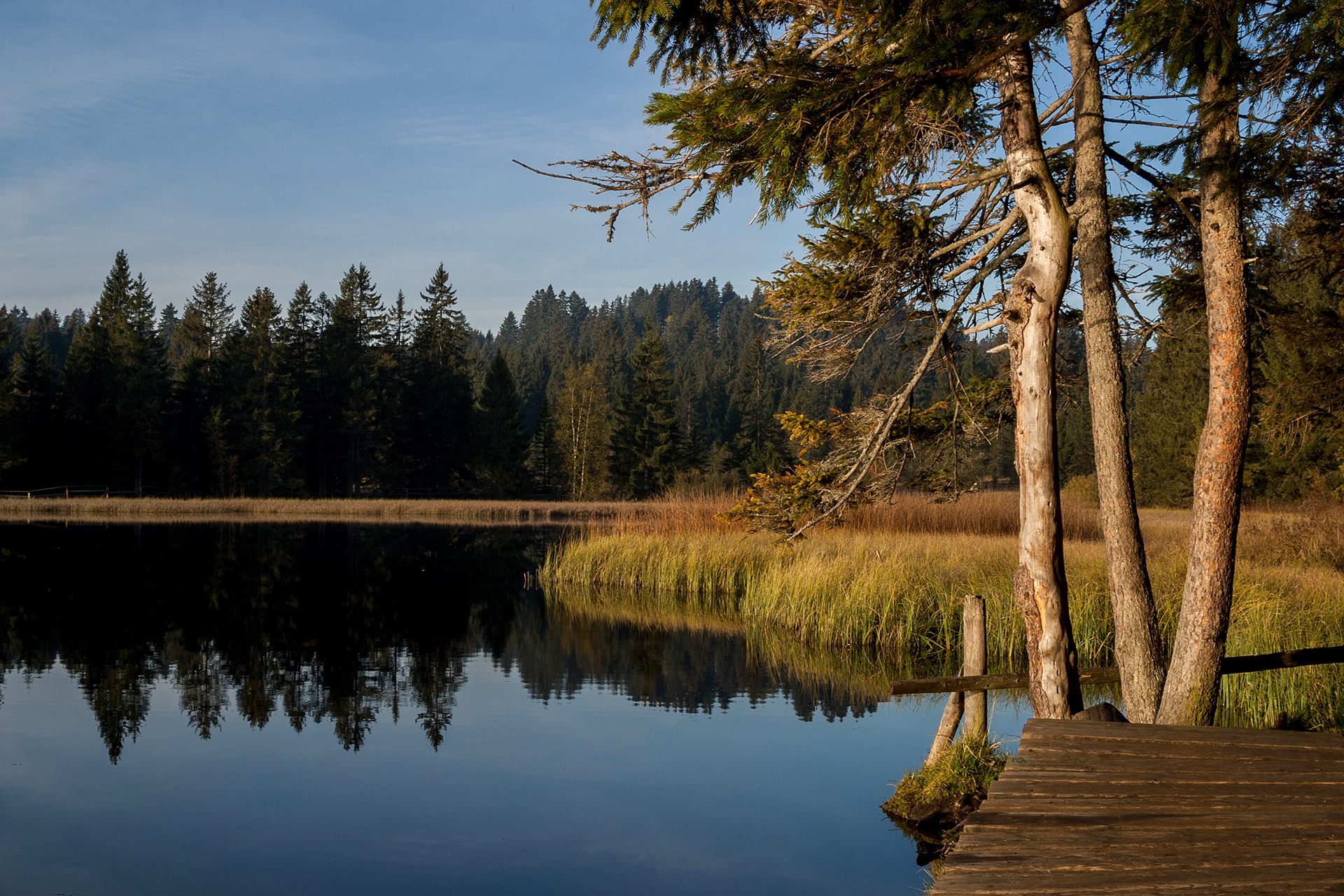 Etang de la Gruère bei Saignelégier (JU)